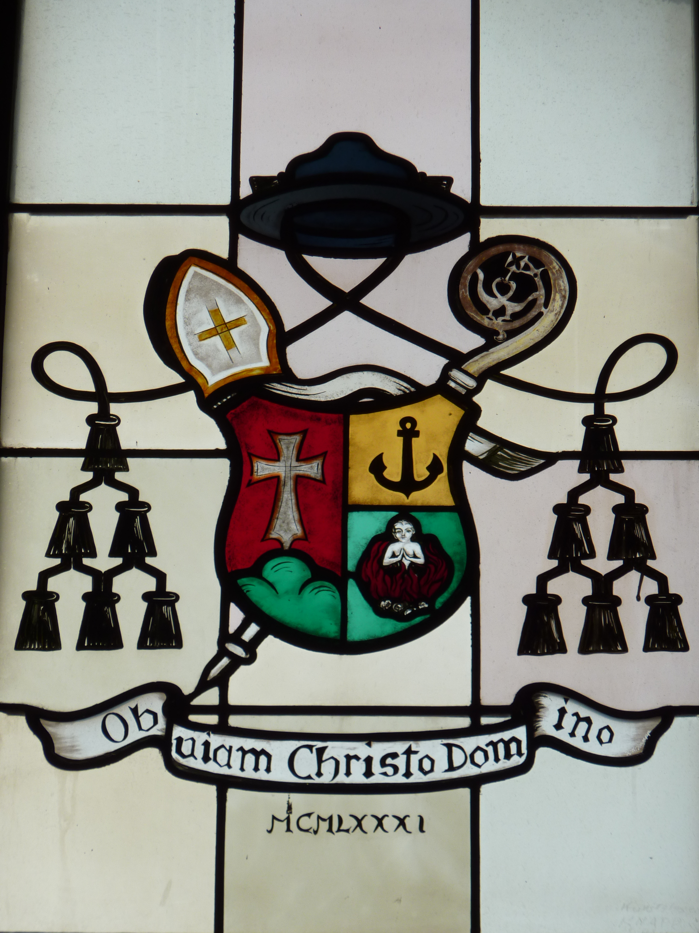 Pfarrkirche Gansbach (Gemeinde Dunkelsteinerwald) in Niederösterreich - Glasfenster mit dem Wappen von Abt Clemens Lashofer, Stift Göttweig, (1973-2009) im östlichen Joch des südlichen Seitenschiffes (=Turmuntergeschoß); die Jahreszahl 1981 bezieht sich auf die Erneuerung der Glasfenster in der Pfarrkirche Gansbach